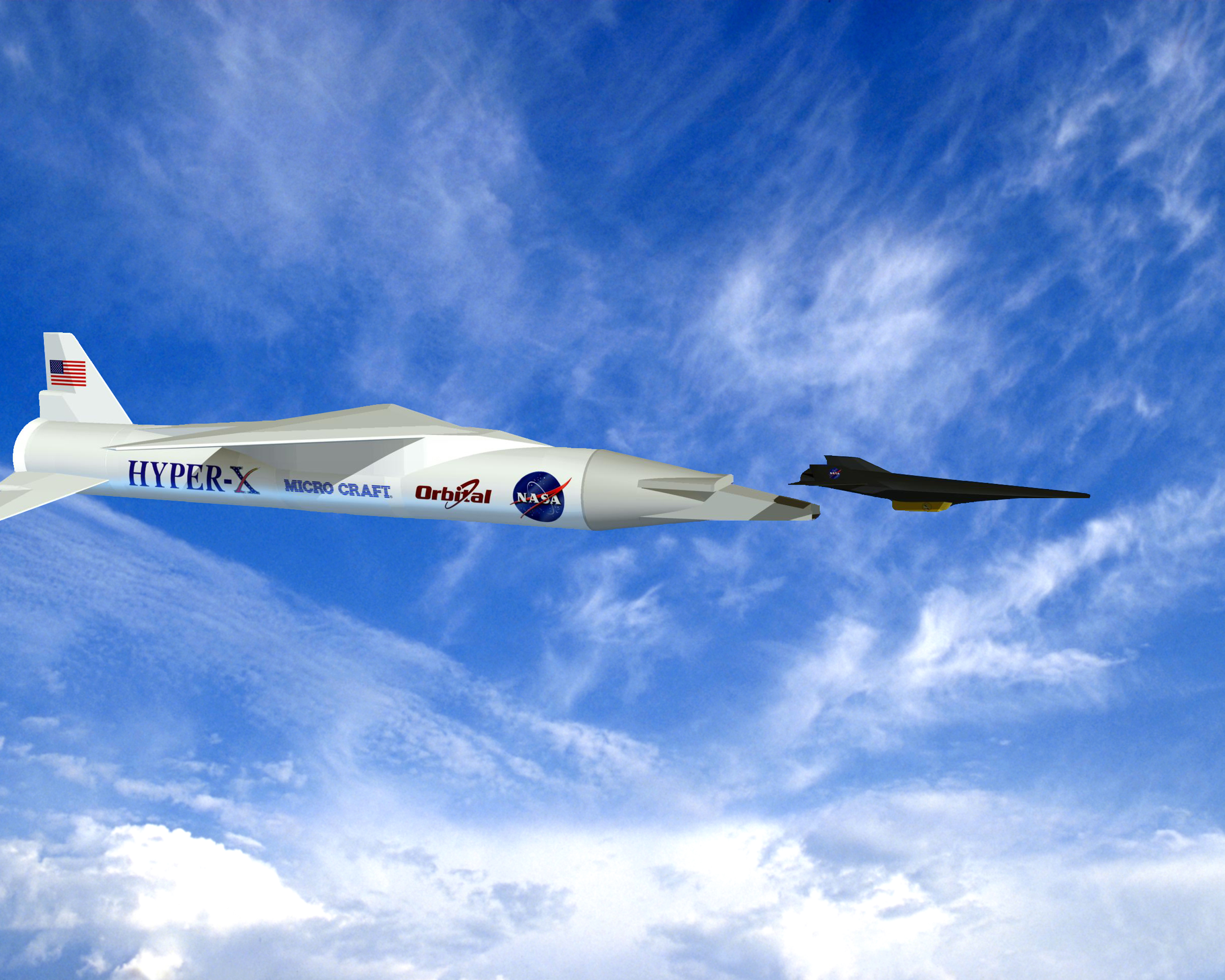 X-43A脫離飛馬座火箭預想圖 必須在超音速狀態下才能點燃超音速燃燒脈衝噴射引擎(Scramjet)的X-43A極超音速實驗機，在空中與飛馬座火箭飛離的電腦預想圖。